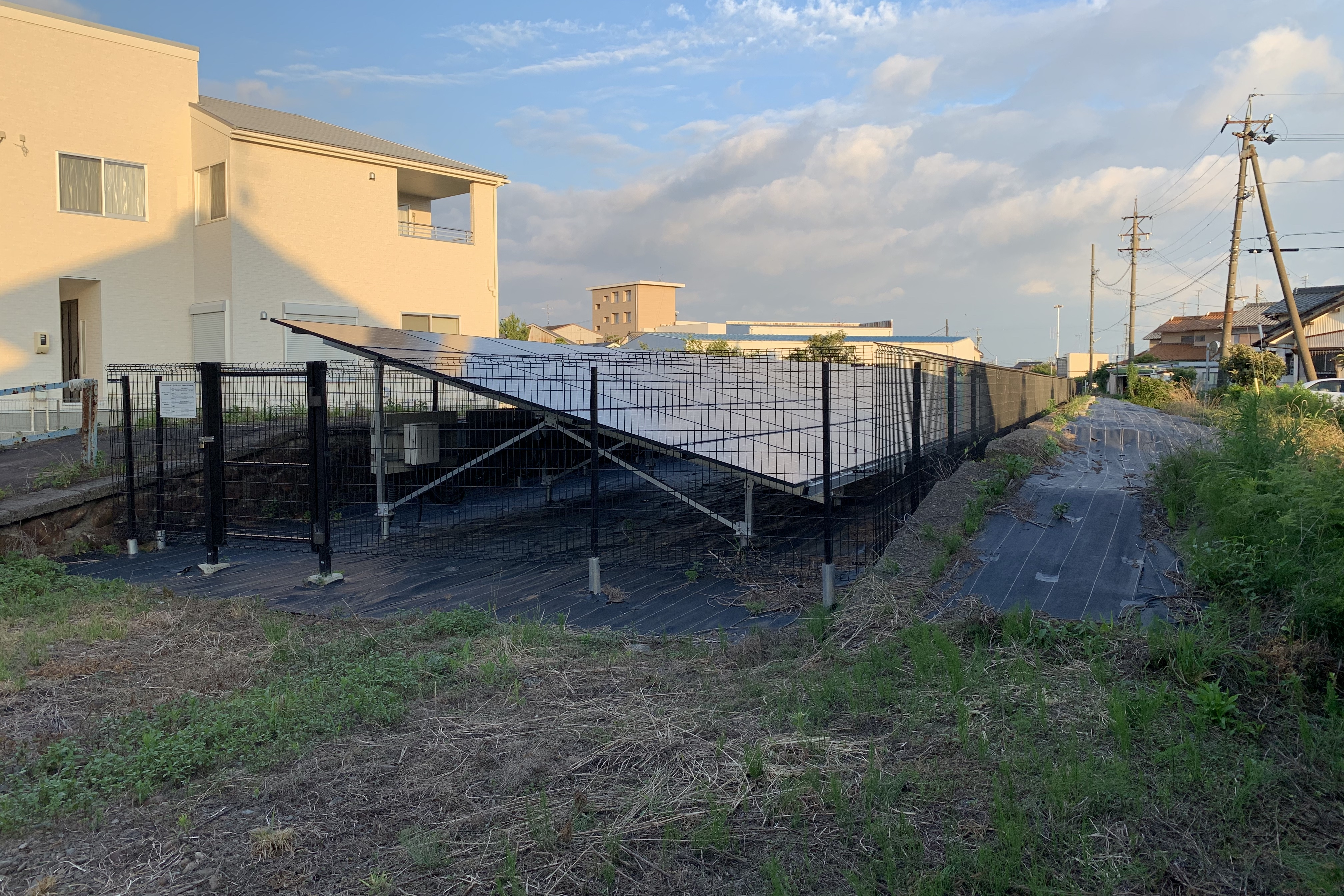 名鉄牧野駅跡（対面ホーム）